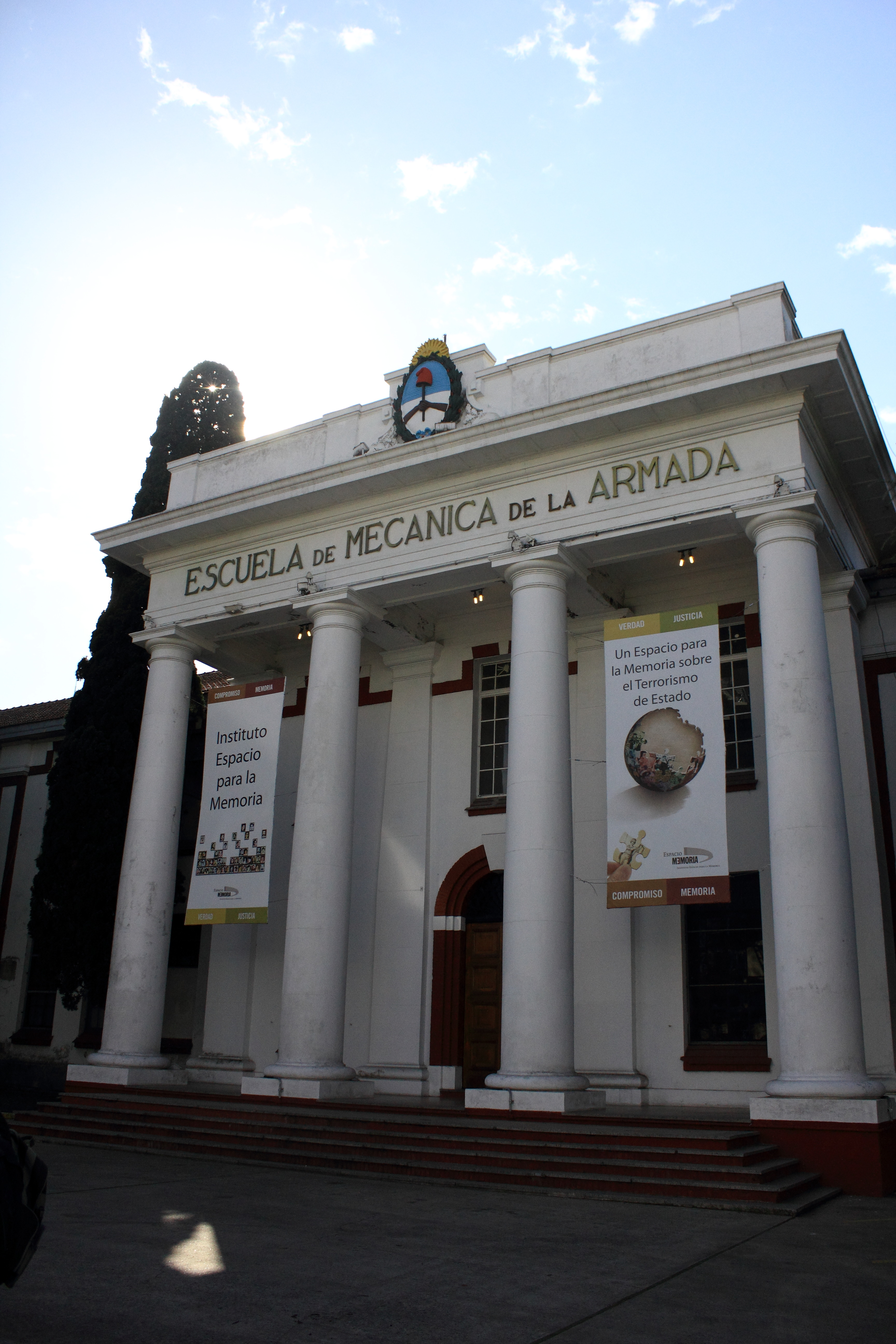 Entrada a la ex Escuela de Mecánica de la Armada, actualmente Espacio Para La Memoria